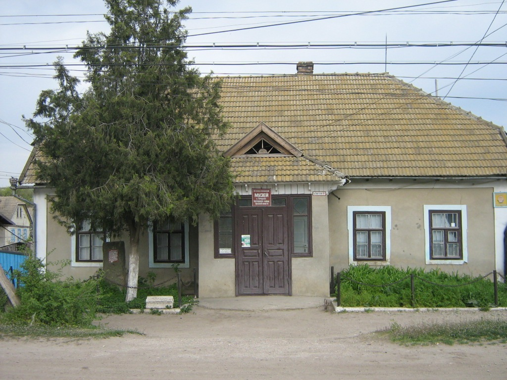 Здание музея с. Огородное